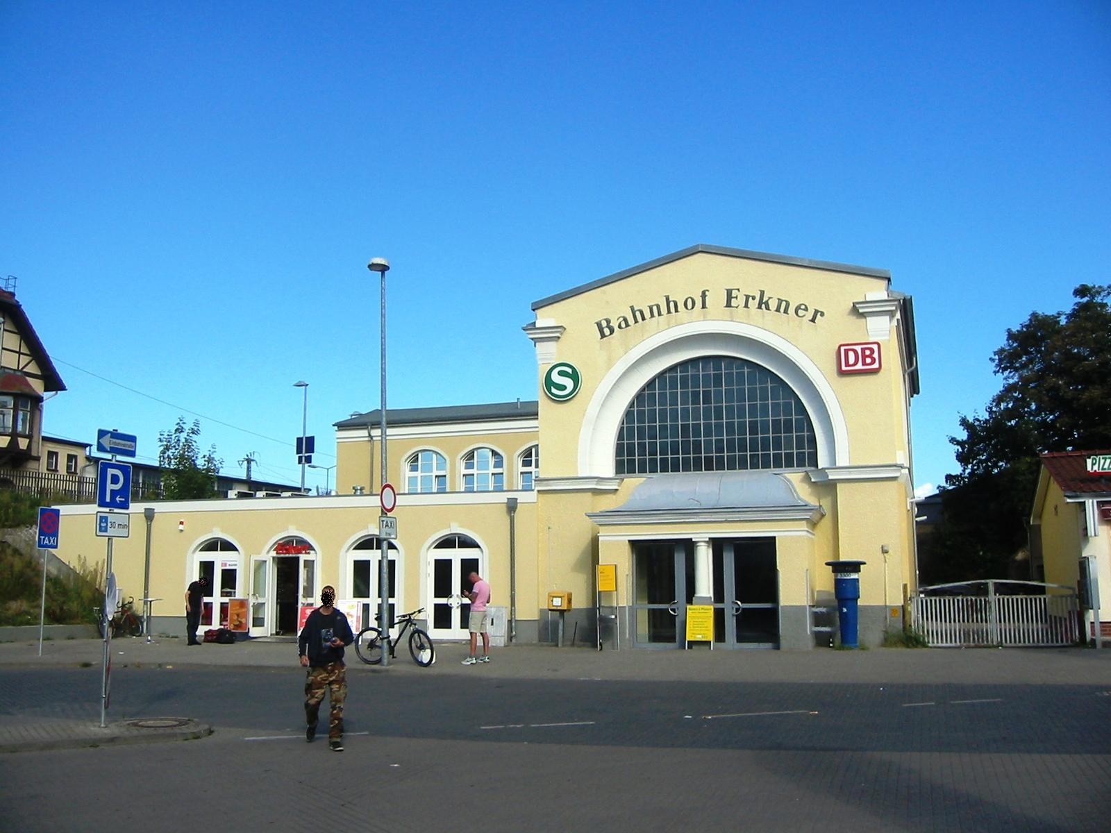 Bahnhofsgebäude in der Stadt Erkner, Land Brandenburg